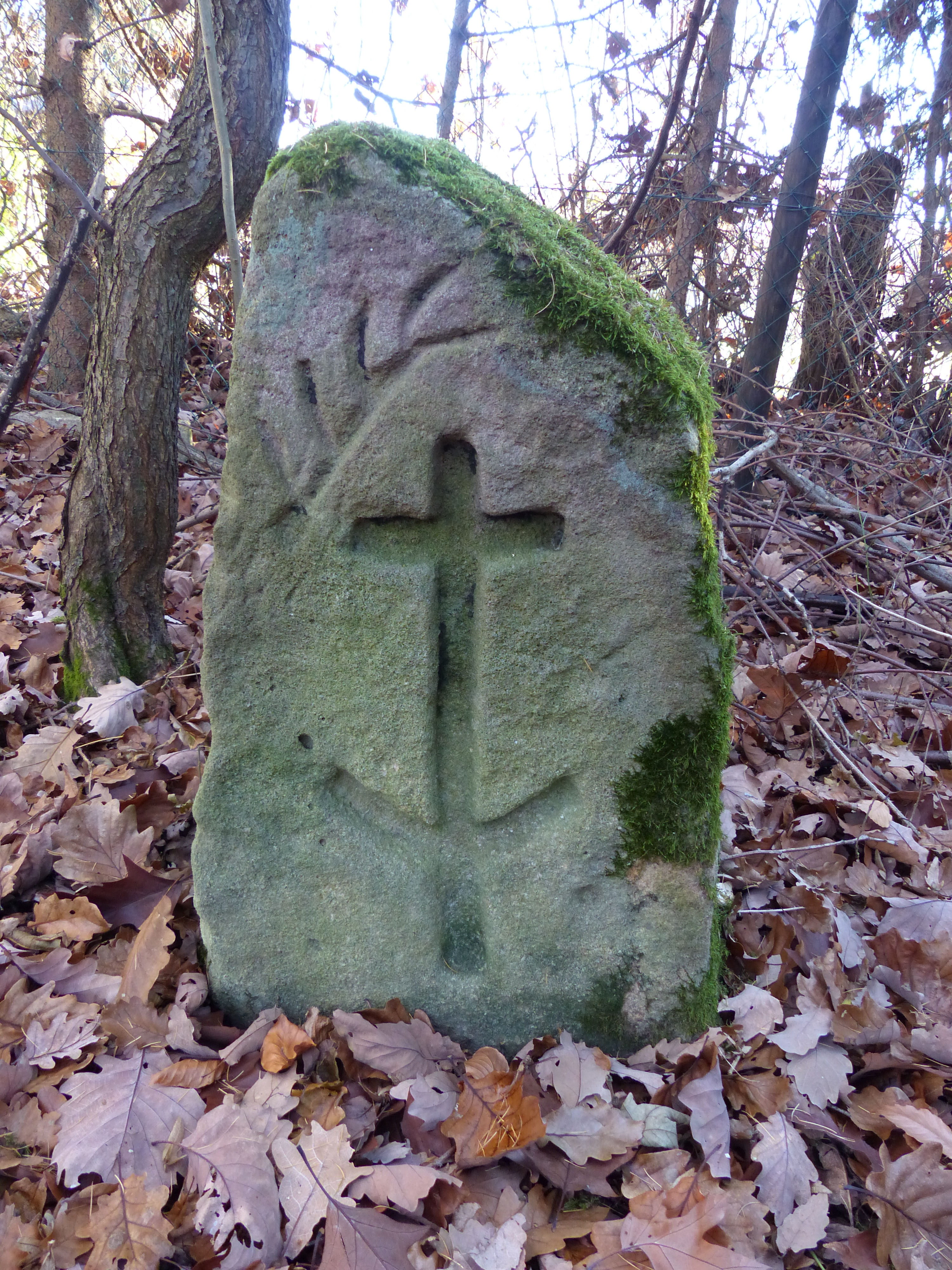 Grenzstein im Katzenbach(wald) (Stadtbezirk Hedelfingen), Grenzverlauf zwischen dem Stuttgarter Stadtteil Hedelfingen und Ruit (Stadt Ostfildern), Stuttgart, Deutschland